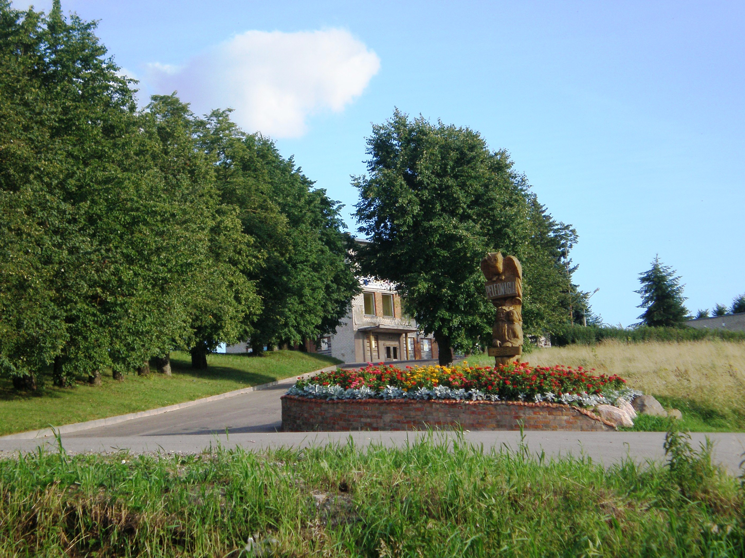 Localidad de Pelėdnagiai en Municipio de Kėdainiai, Lituania